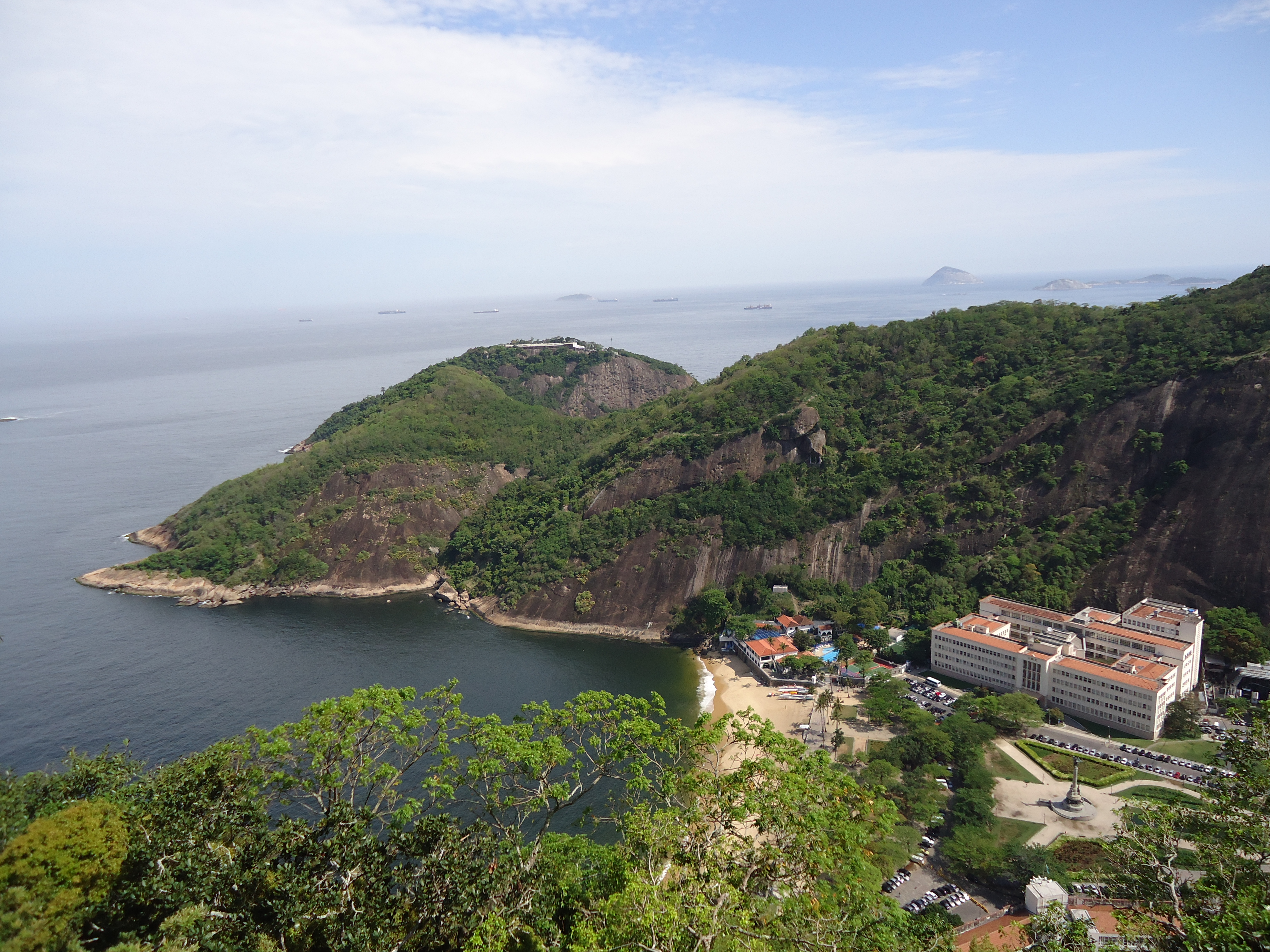 Praia Vermelha e morro do Leme, cidade e estado do Rio de Janeiro, Brasil: vista a partir do morro do Pão de Açúcar.